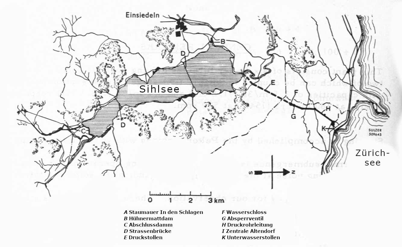 Anlageschema des Etzelwerks. Legende deutsch